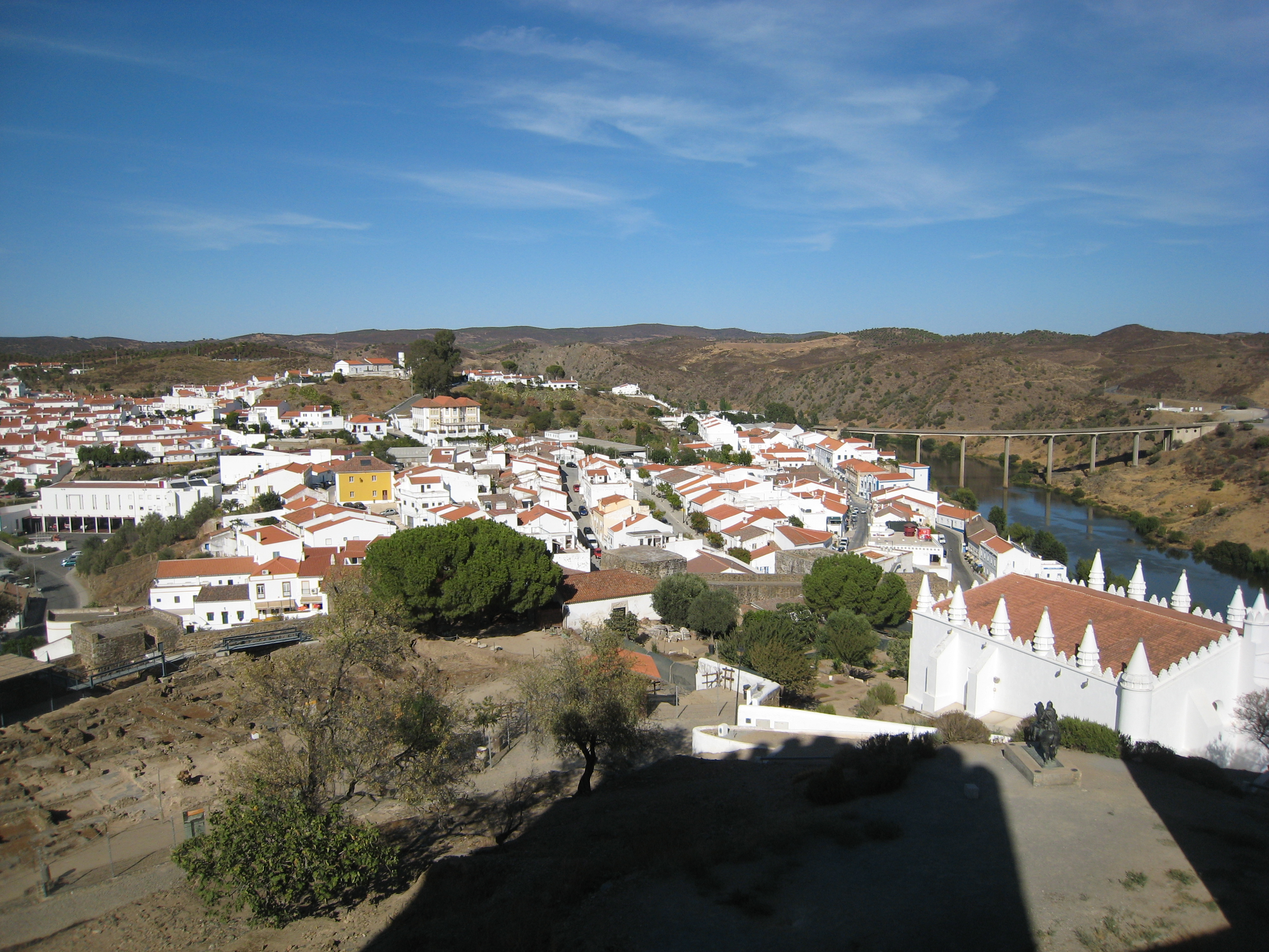 Mértola, Alentejo, Portugal.